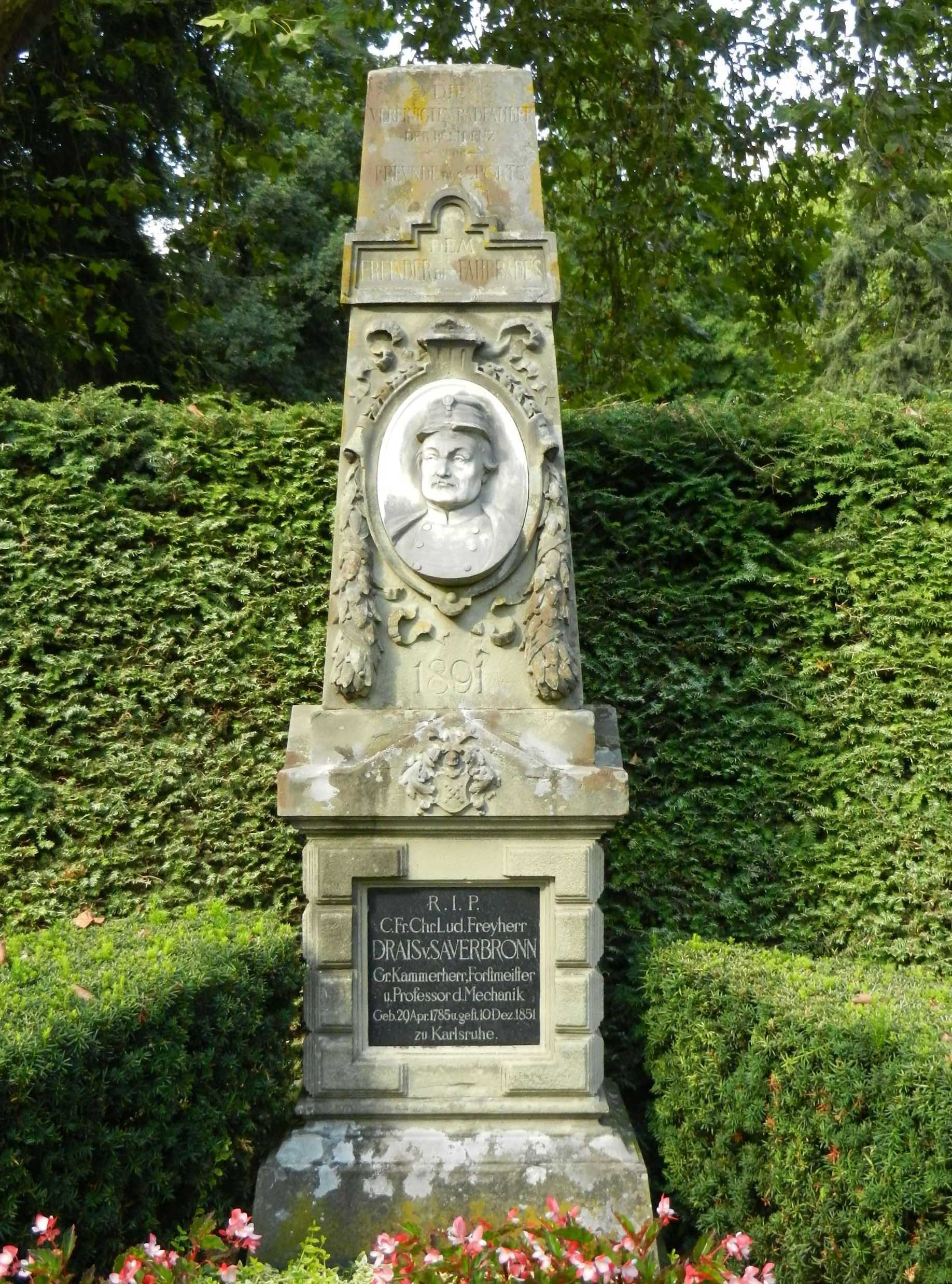 Grabmal Freiherr von Drais